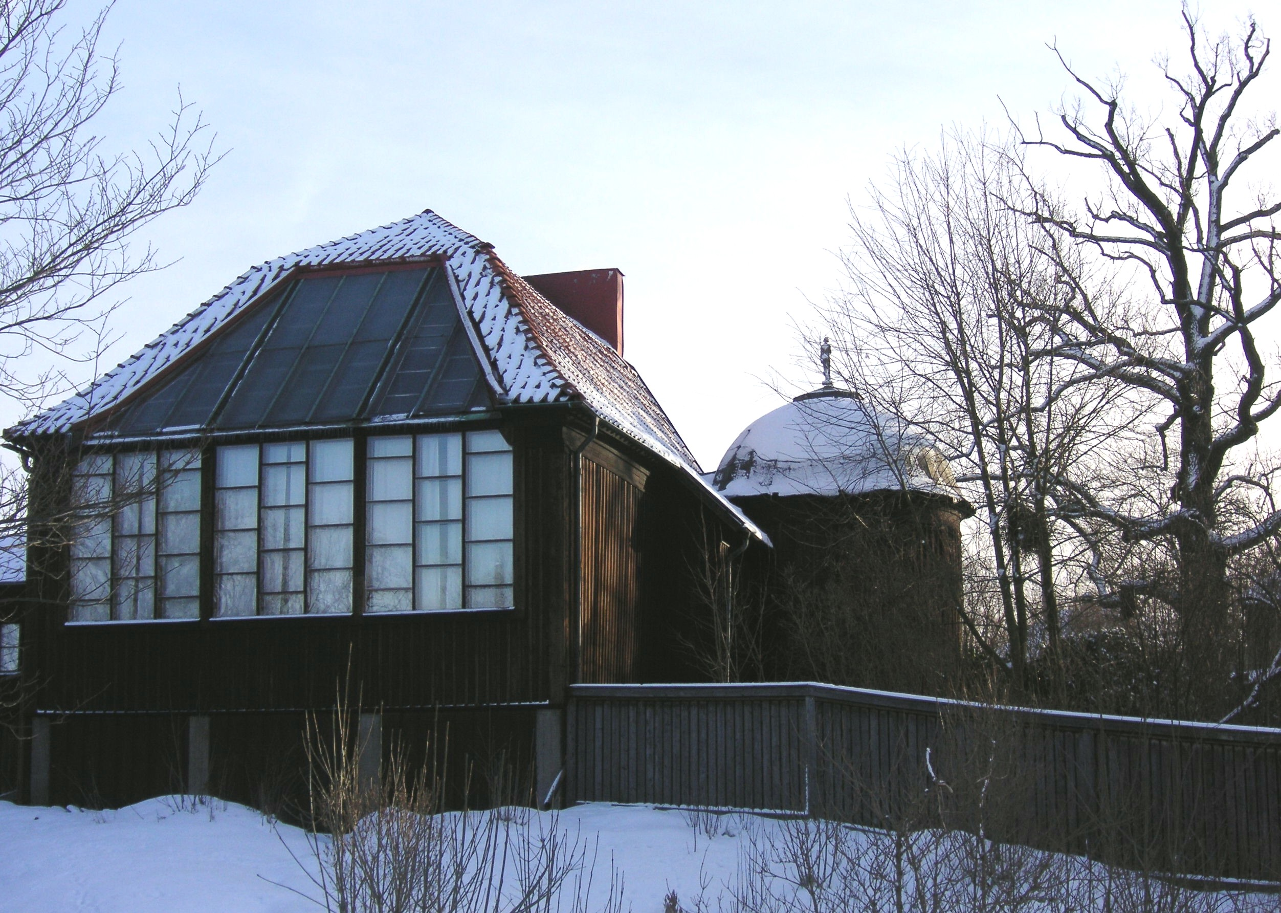 Carl Eldhs Ateljémuseum i Stockholm